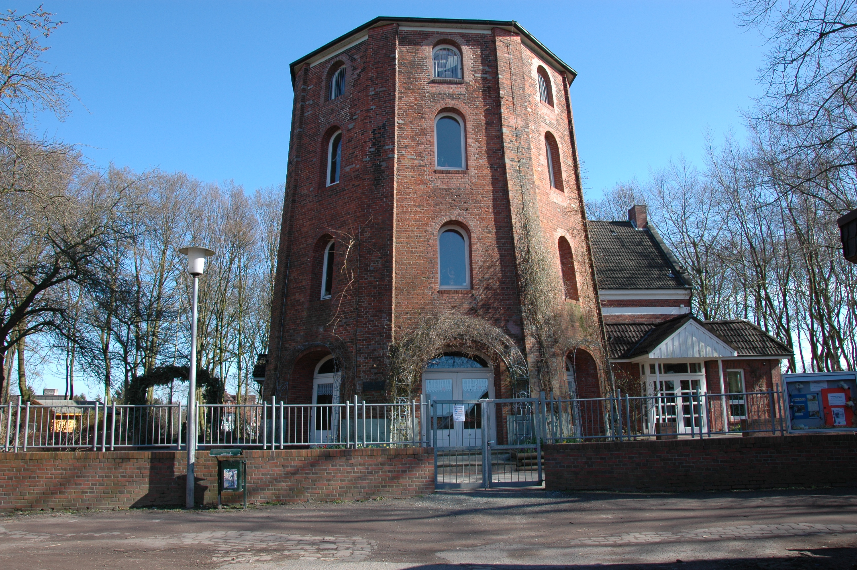 Die "Rote Mühle", frühere Windmühle, in Emden (nur der Mühlensockel ist erhalten). Sie wird heute von der ev.-ref. Gemeinde als Kindergarten genutzt. The "Rote Mühle" - ("Red Mill"), a former windmill, in Emden, Lower Saxony, Germany. Nowadays it is used as a kindergarten by ref. prot. parish. Own work, picture taken at the 11th of March, 2007 by Rolf Drewes